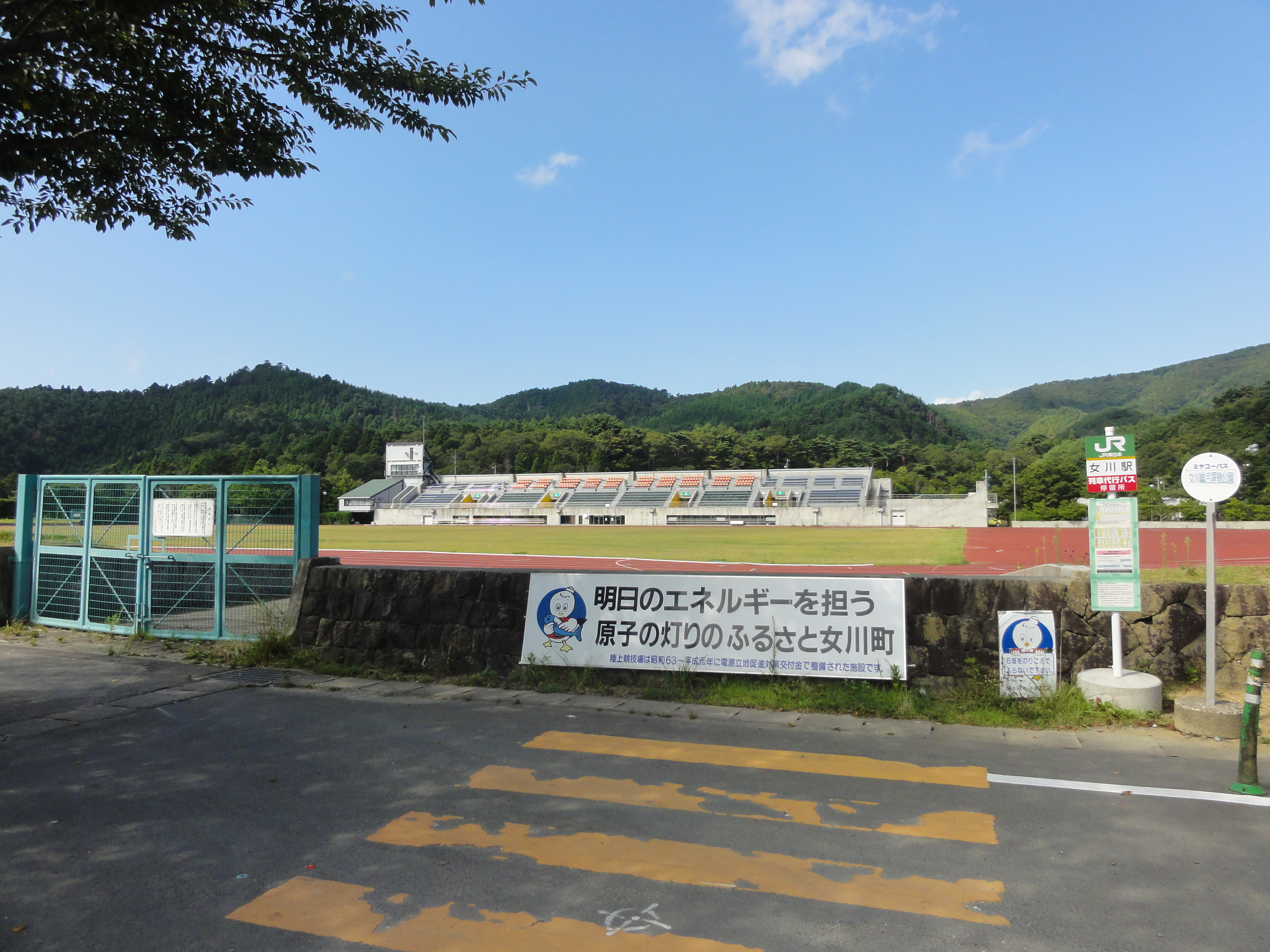 代行バス女川駅バス停